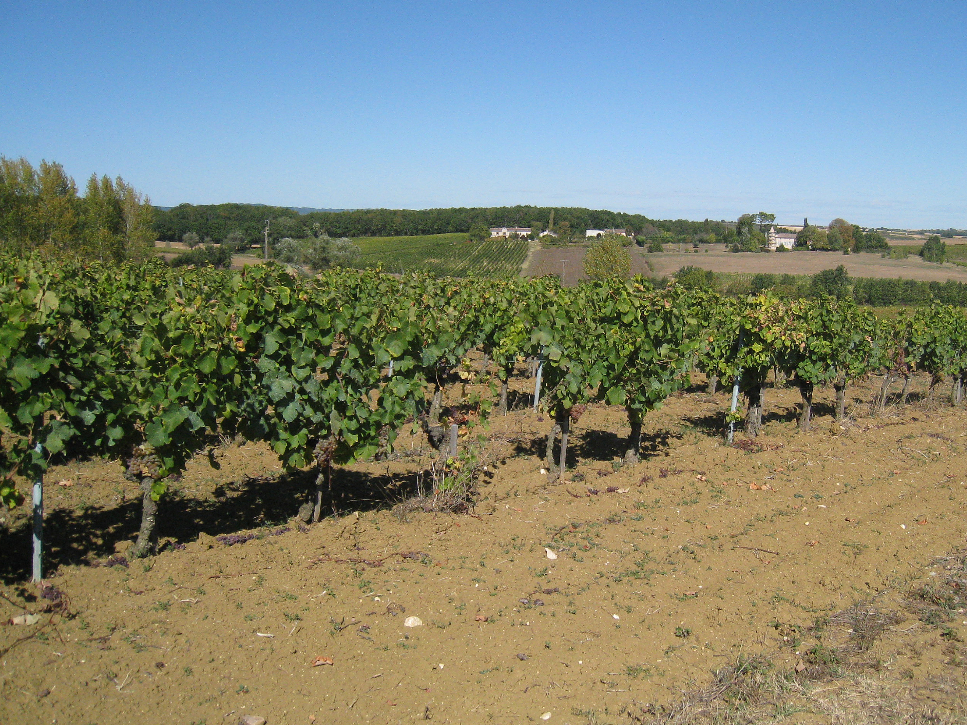 Vignoble à Cahuzac-sur-Vère, Tarn, France.